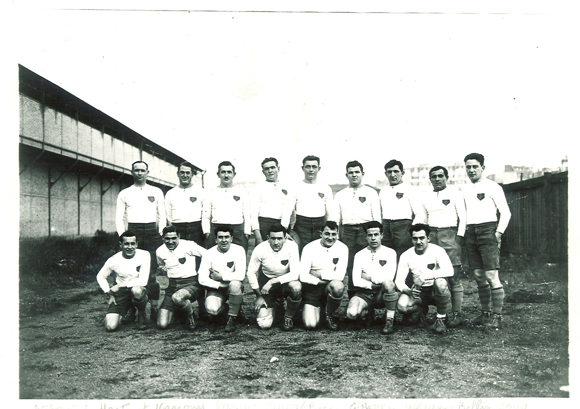 Équipe de l'AS Montferrand en 1930. Michel Boucheron assis au 1er rang entre Barthélemy et Maurice Savy.